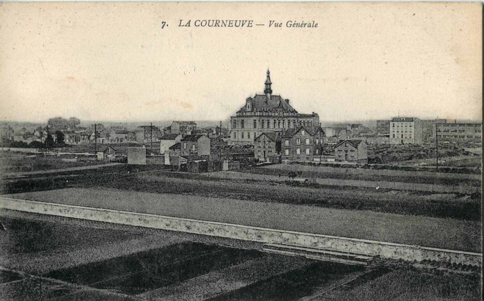 Carte postale ancienne éditée par ELD, n°7 : LA COURNEUVE - Vue Générale